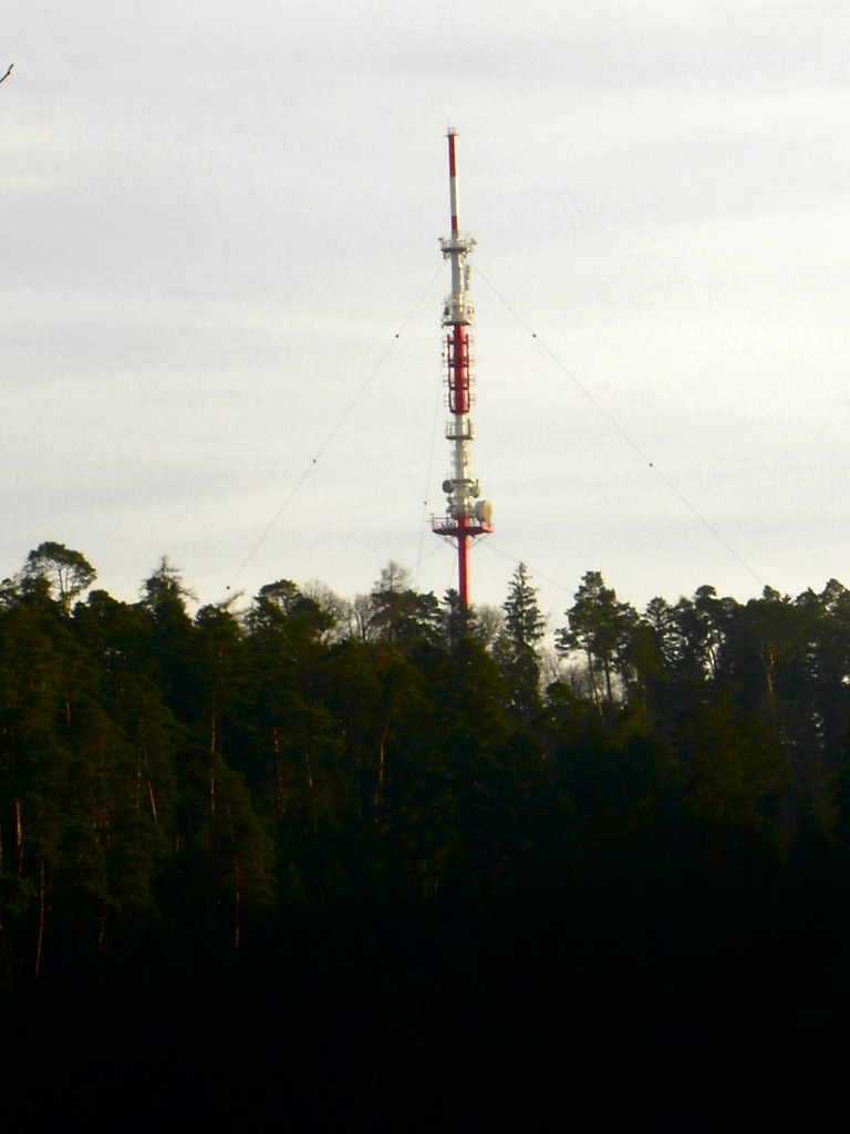 Émetteur du Bois de la Vierge